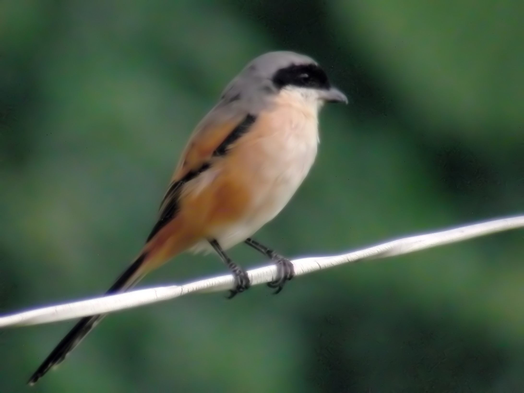 Saw at farmlands .